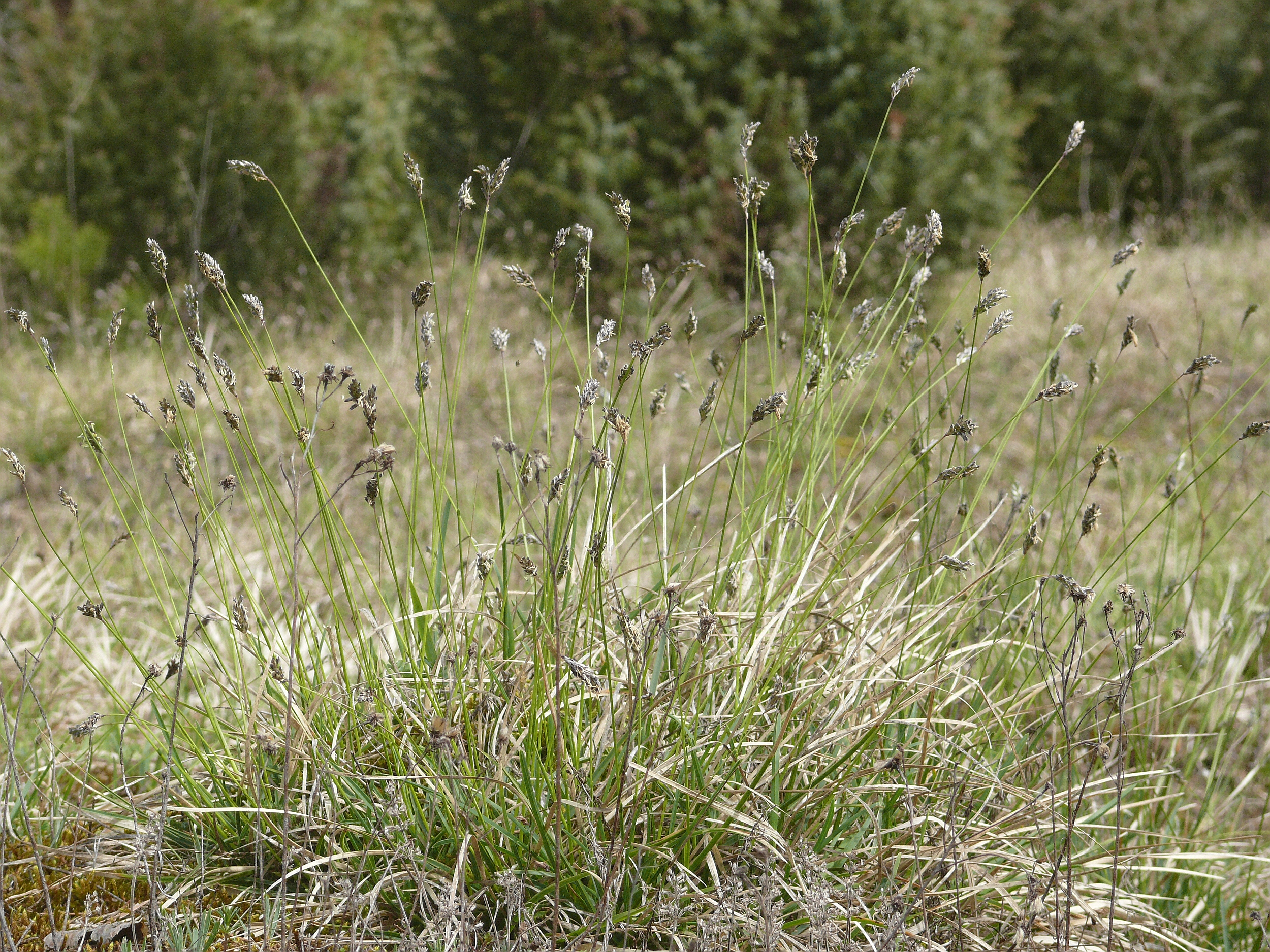 Sesleria albicans, Tauberland, Deutschland